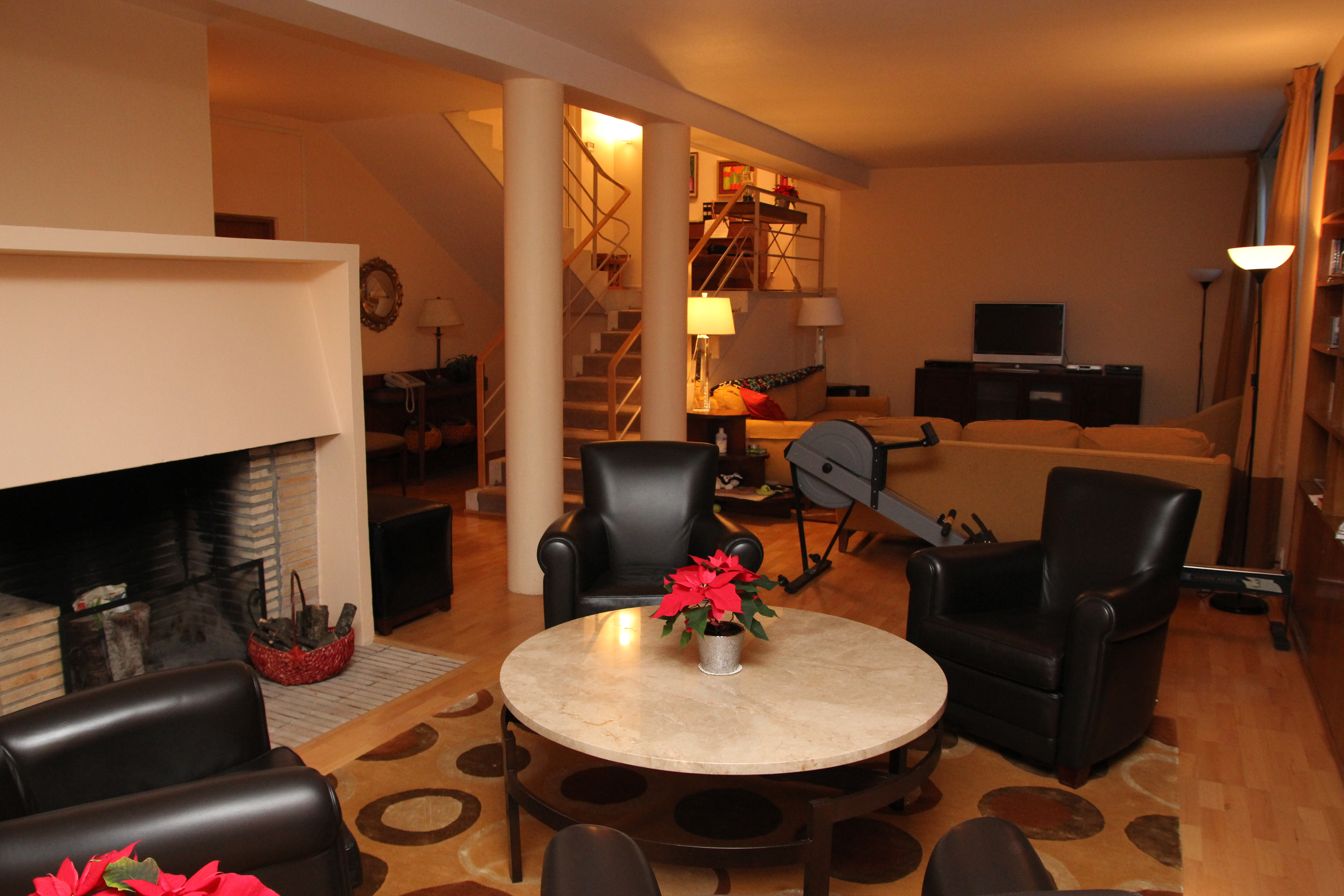 Villa Ditlev-Simonsen, peisestue